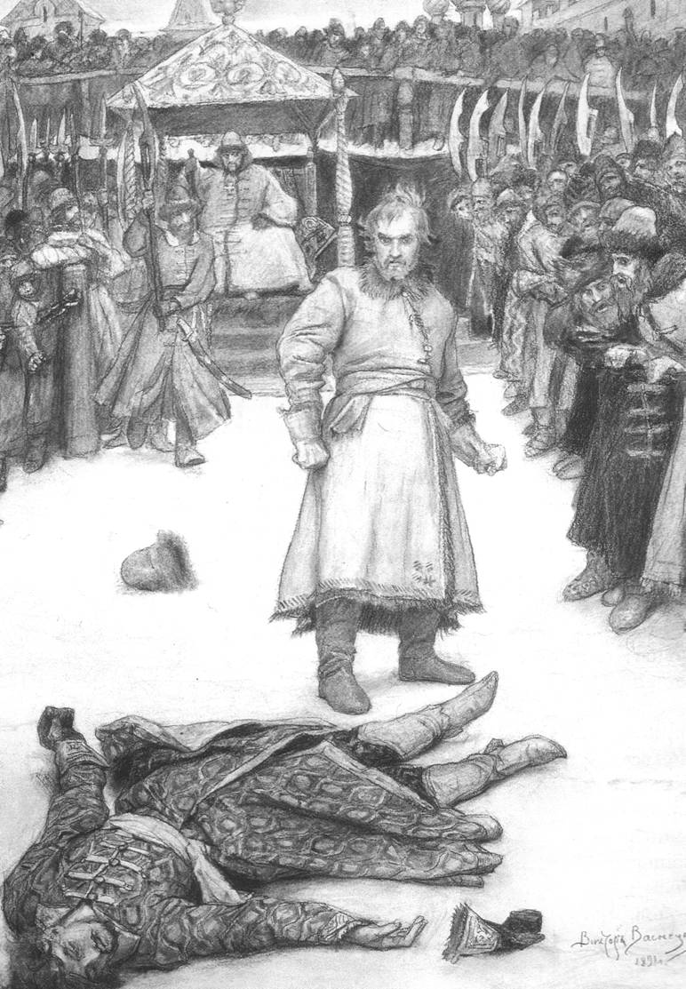 Кулачный бой. Иллюстрация Виктора Михайловича Васнецова к исторической поэме Михаила Юрьевича Лермонтова «Песня про царя Ивана Васильевича, молодого опричника и удалого купца Калашникова». Итальянский карандаш. 1891 г.